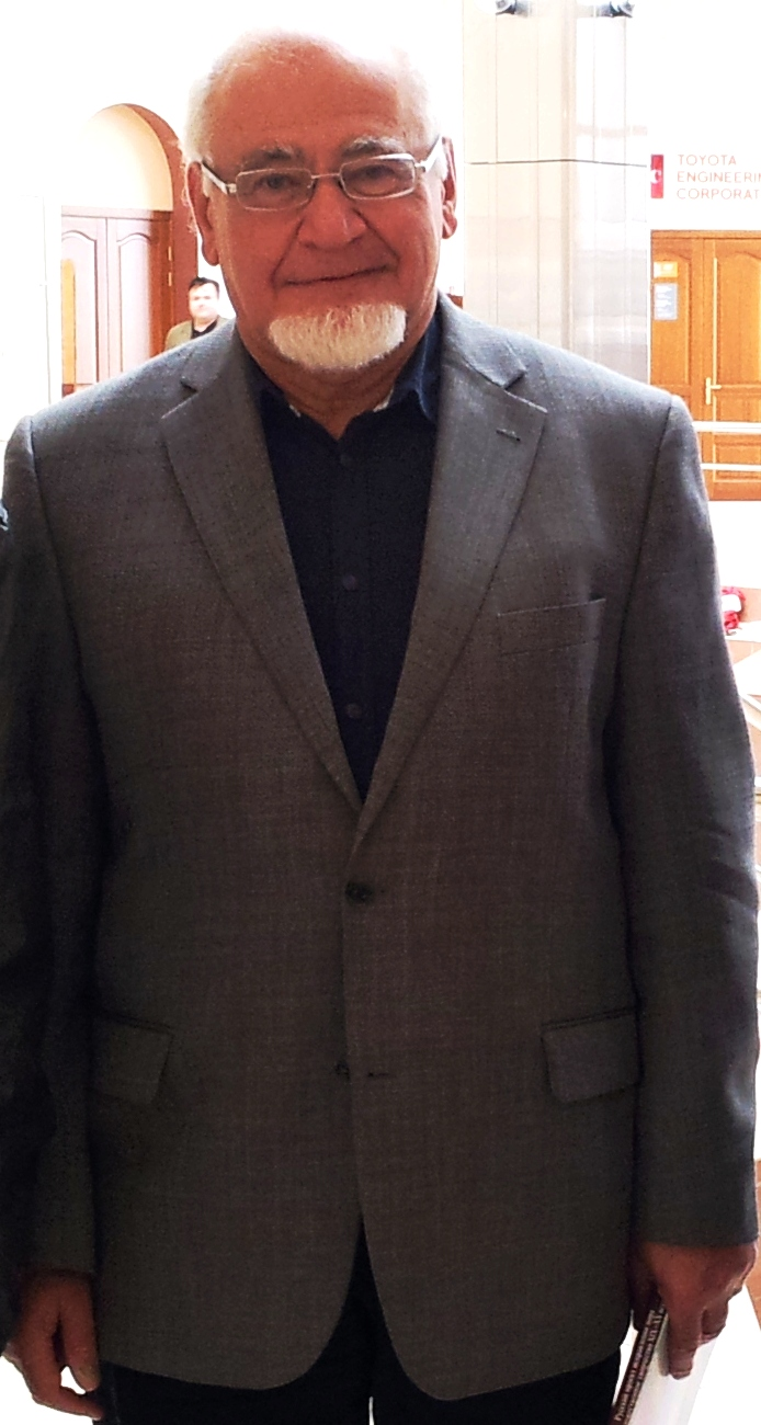 Фотография Б. М. Гаспарова во время посещения Сибирского федерального университета